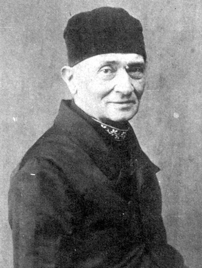 Francisco de Paula González Vigil, clérigo peruano que desafío a la Iglesia.